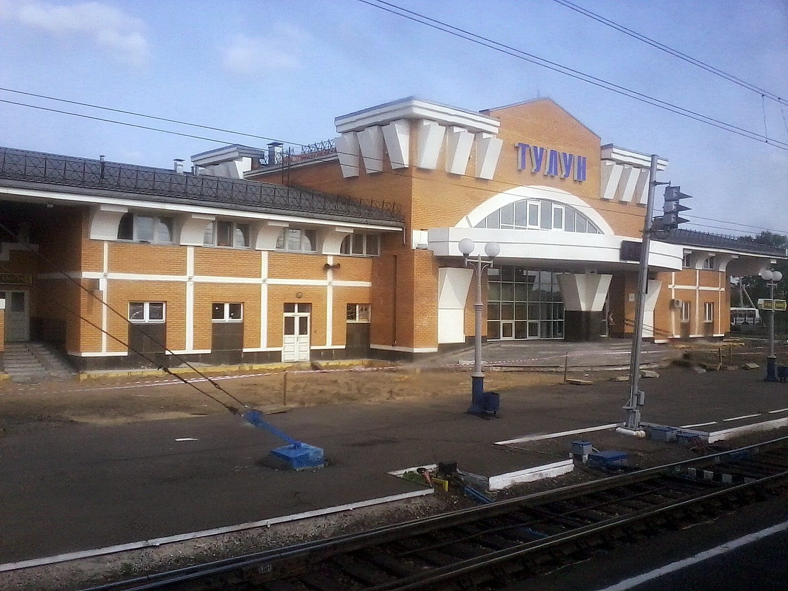 Вокзал станции Тулун из окна вагона.